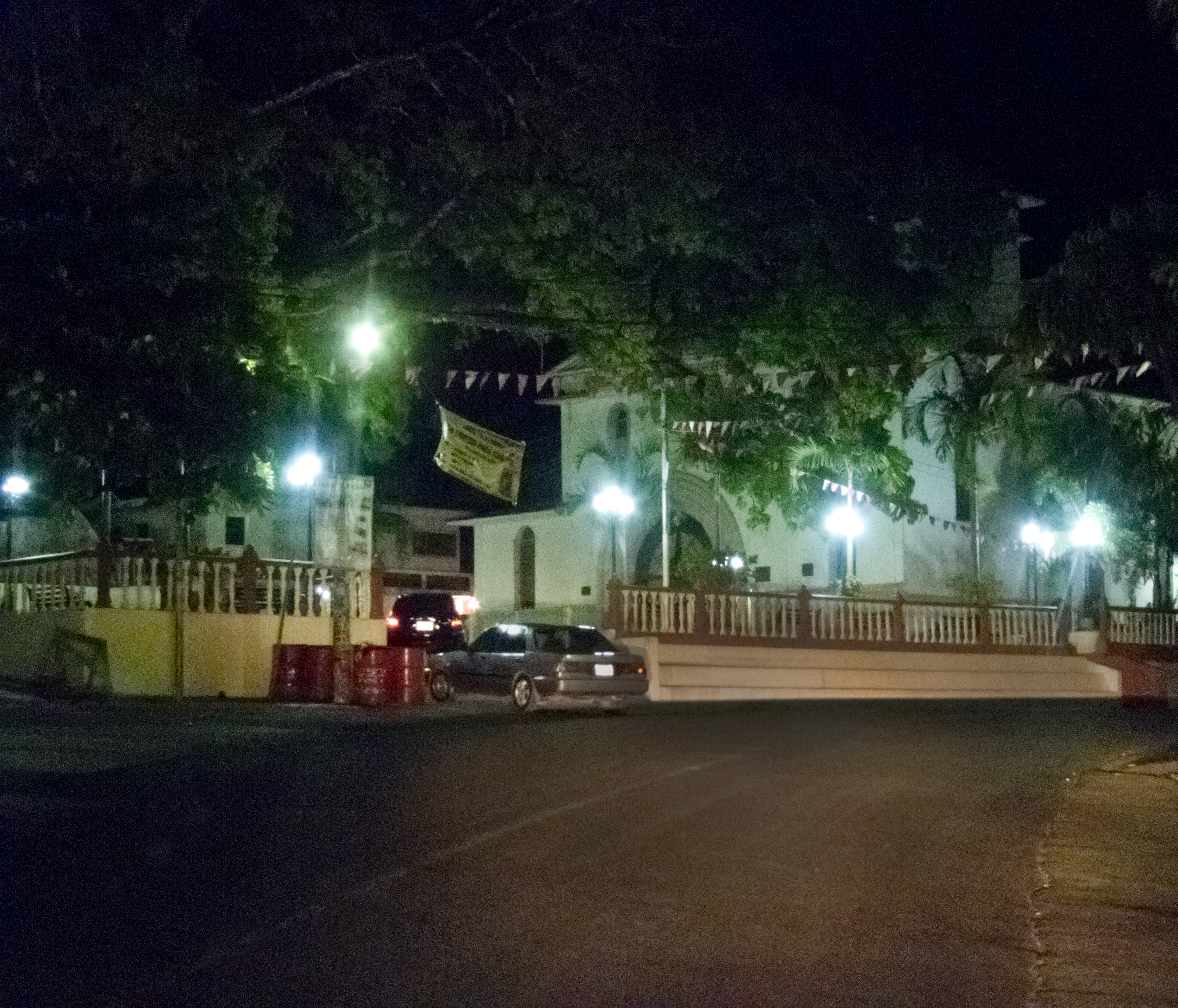 Santo Tomás, visto en la noche, la catedral en el centro frente al alcaldía de Sto Tomas